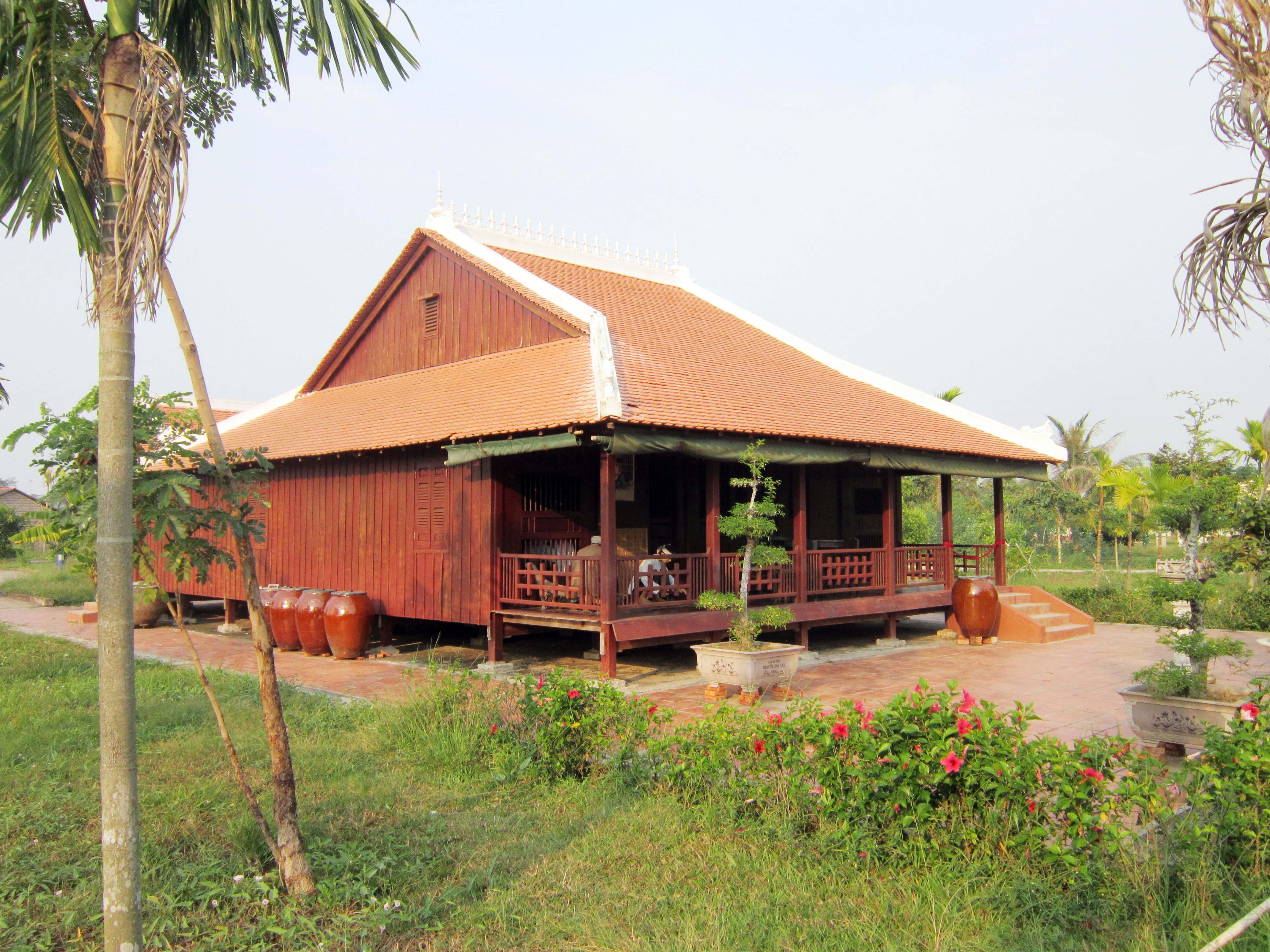 Một ngôi nhà sàn thuyền thống ở Nam Bộ được phục dựng trong Khu di tích Nguyễn Sinh Sắc, thuộc phường 4, thành phố Cao Lãnh, tỉnh Đồng Tháp, Việt Nam